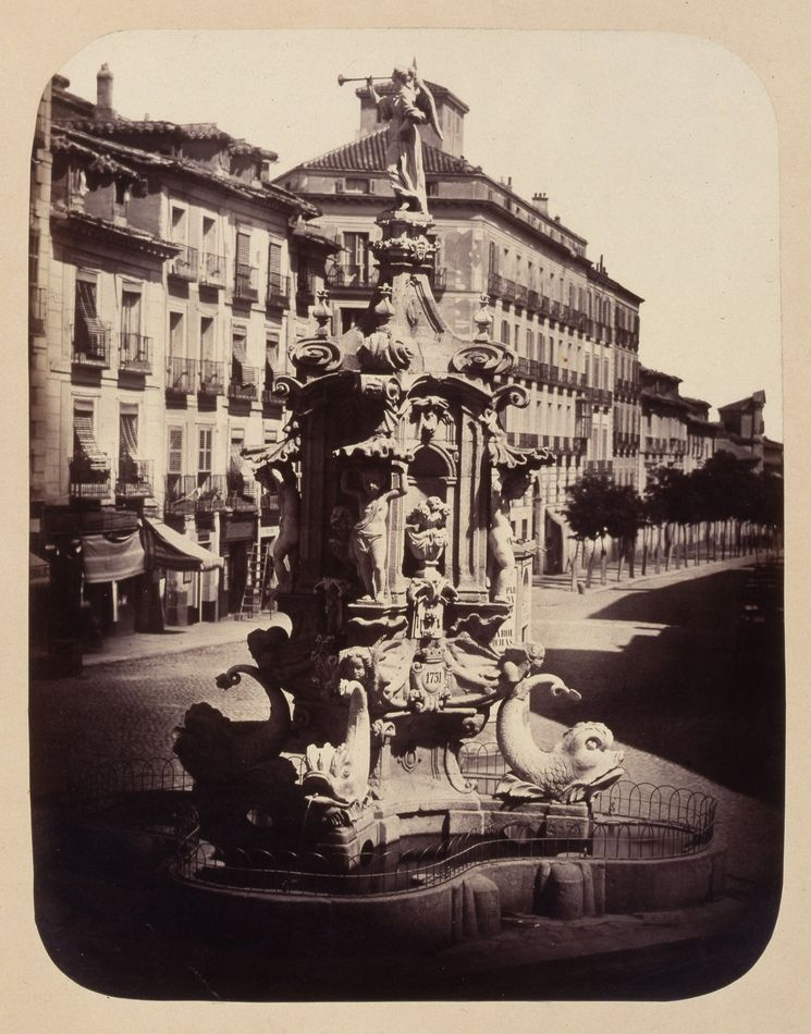 Fuente de ornato en la Plazuela de Antón Martín. Obra en 1864 del fotógrafo toledano Alfonso Begué, muerto el 31 de octubre de 1865. Cartulina sepia. Albúmina. 43 x 32 cm. Fotografía contenida en un álbum procedente del Archivo de Villa y trasladado al Museo de Historia en 1983.